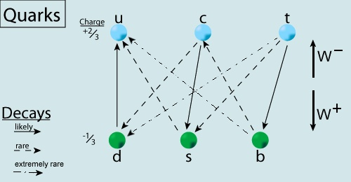 Svak nedbrytning av kvarker [1].